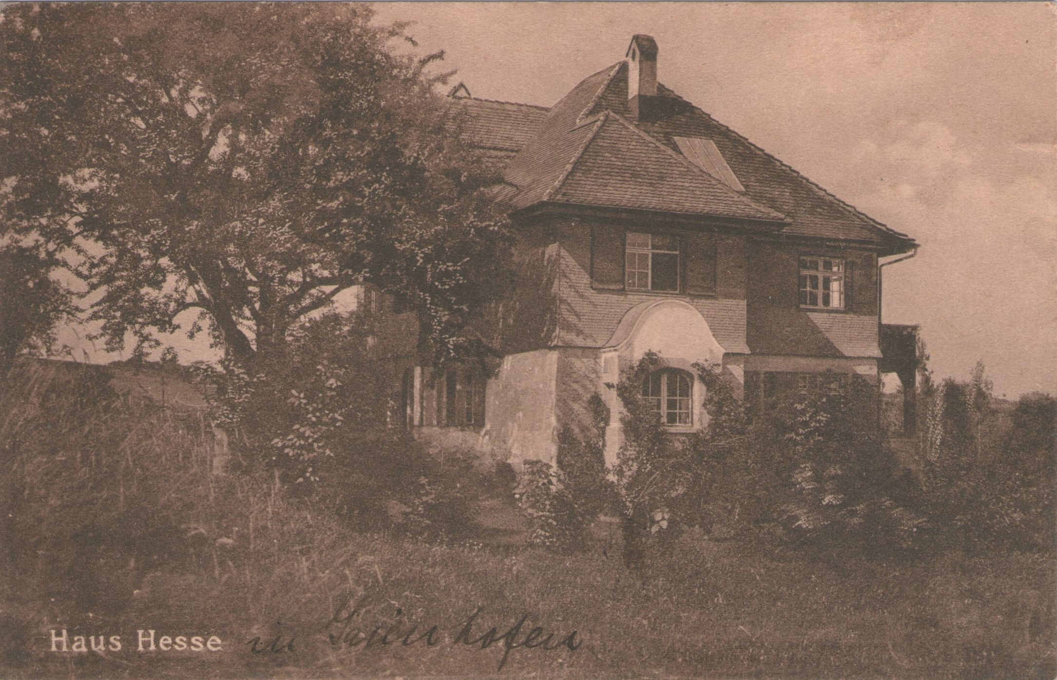 "Haus Hesse", Gaienhofen, um 1910. Zeitgenössische Ansichtkarte, beschriftet, gelaufen 1911.